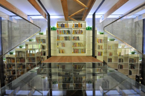 Filia nr 40 Miejskiej Biblioteki Publicznej w Lublinie